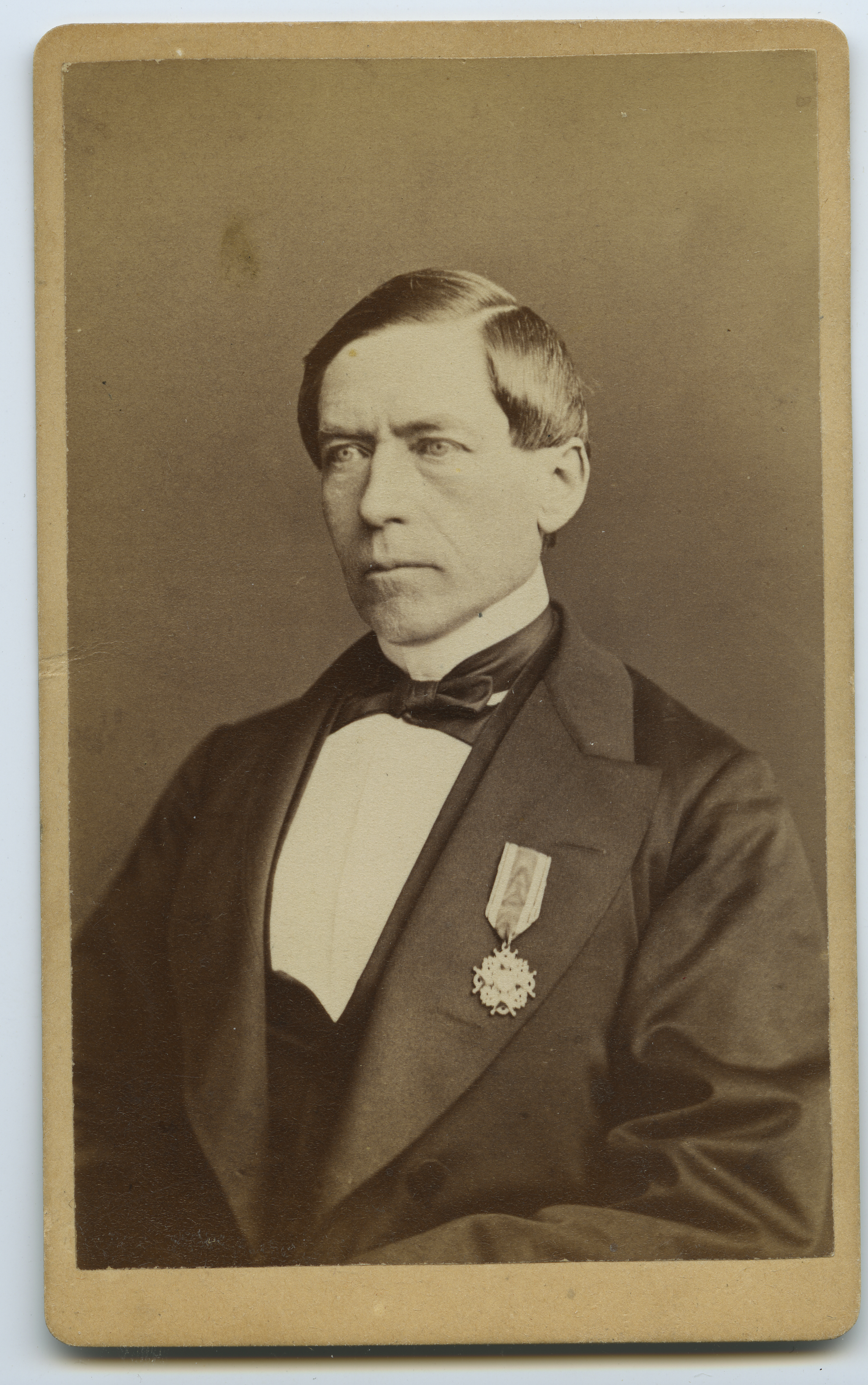 Bildet er hentet fra Arkivverket. Portrett av Jacob Jørgen Kastrup Sømme, 1817 - 1893. Arkivinstitusjon : Statsarkivet i Stavanger Arkivnavn : Prominente personer i Stavanger Amt Sted : Norge, Rogaland, Stavanger, Ukjent Emneord: "Byfogder, Magistrater, Stortingsrepresentanter, Ordensvesen", Portretter, Menn Avbildet: Sømme, Jacob Jørgen Kastrup